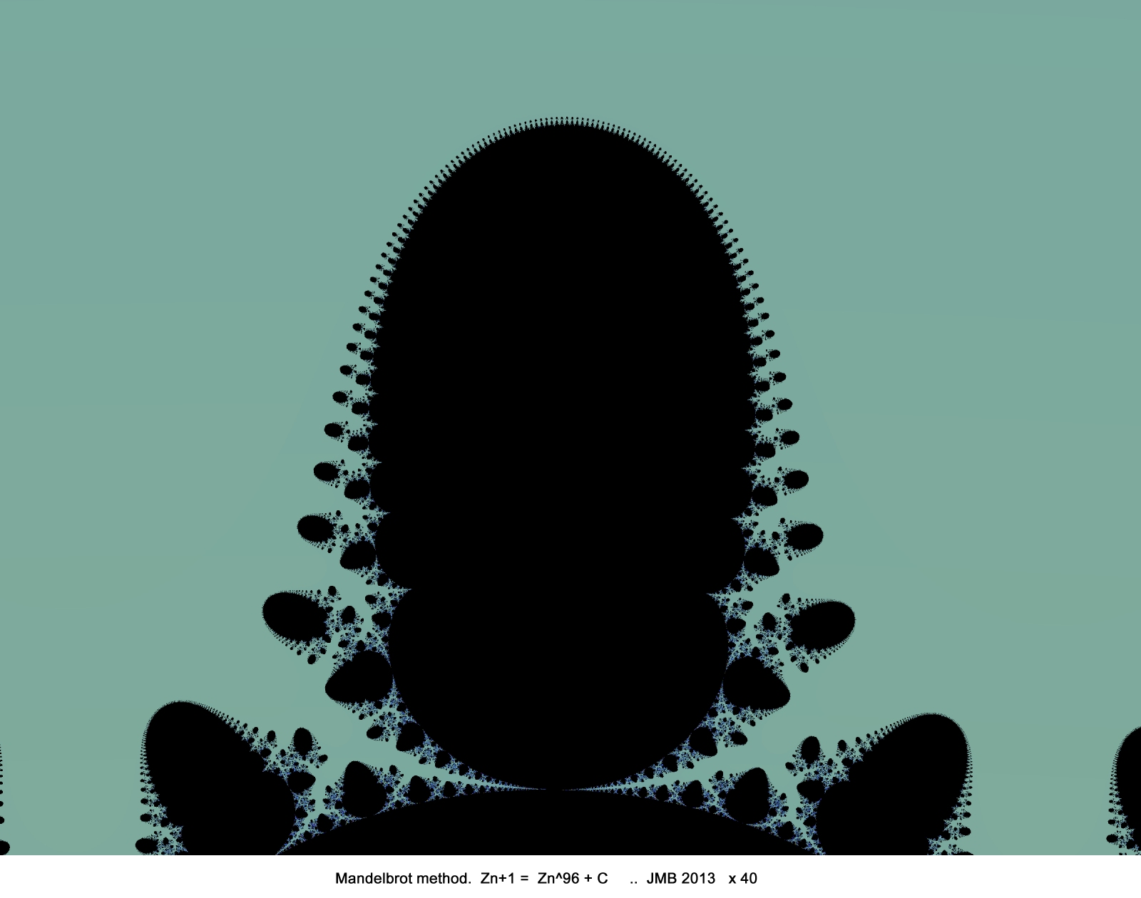 Mandelbrot method. Zn+1 = Zn^96 + C .. JMB 2013 x 40